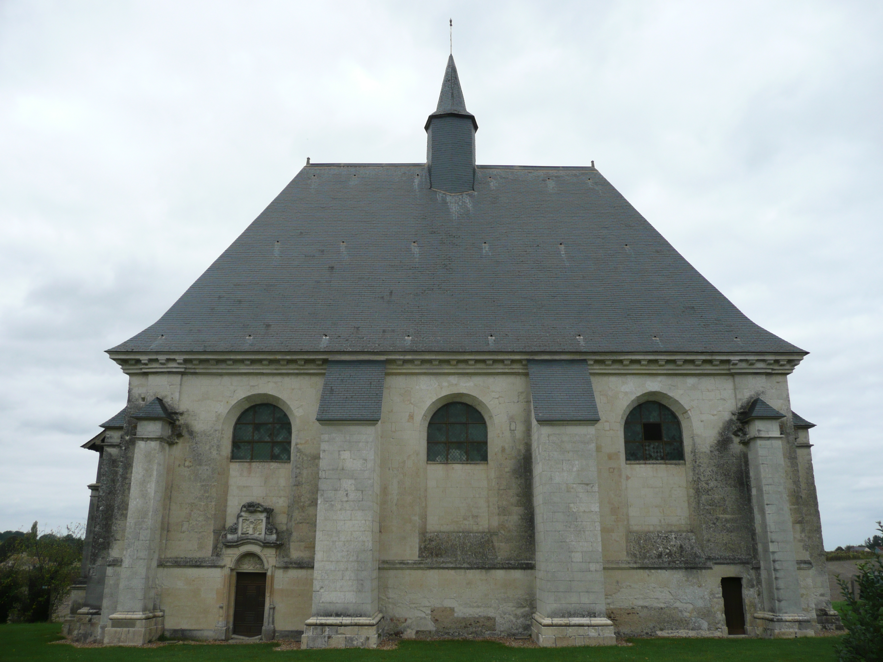 Jarzé - Chapelle .